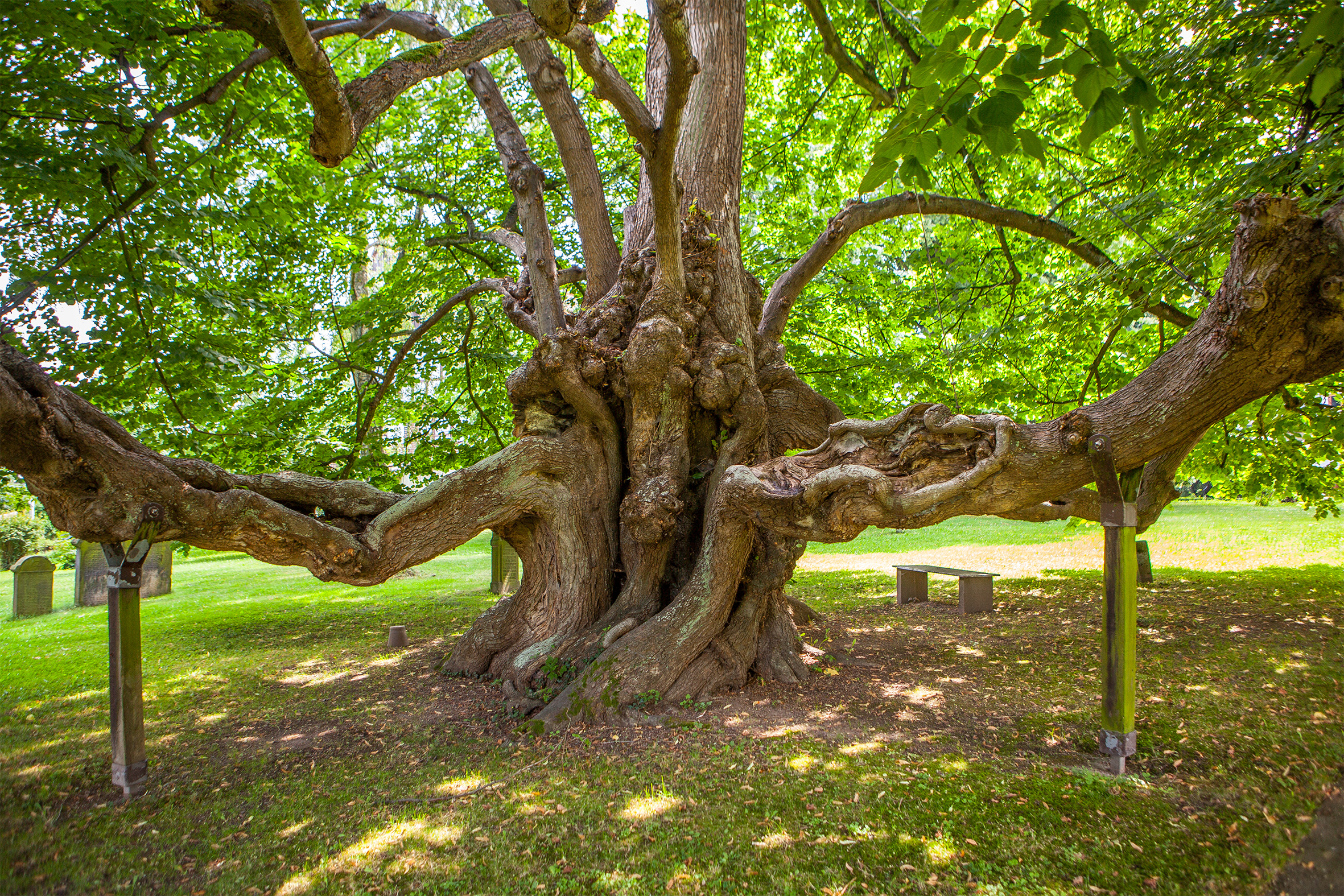 Naturdenkmal "1000-jährige Linde" in Reelkirchen, einem Ortsteil von Blomberg im Kreis Lippe in Nordrhein-Westfalen.